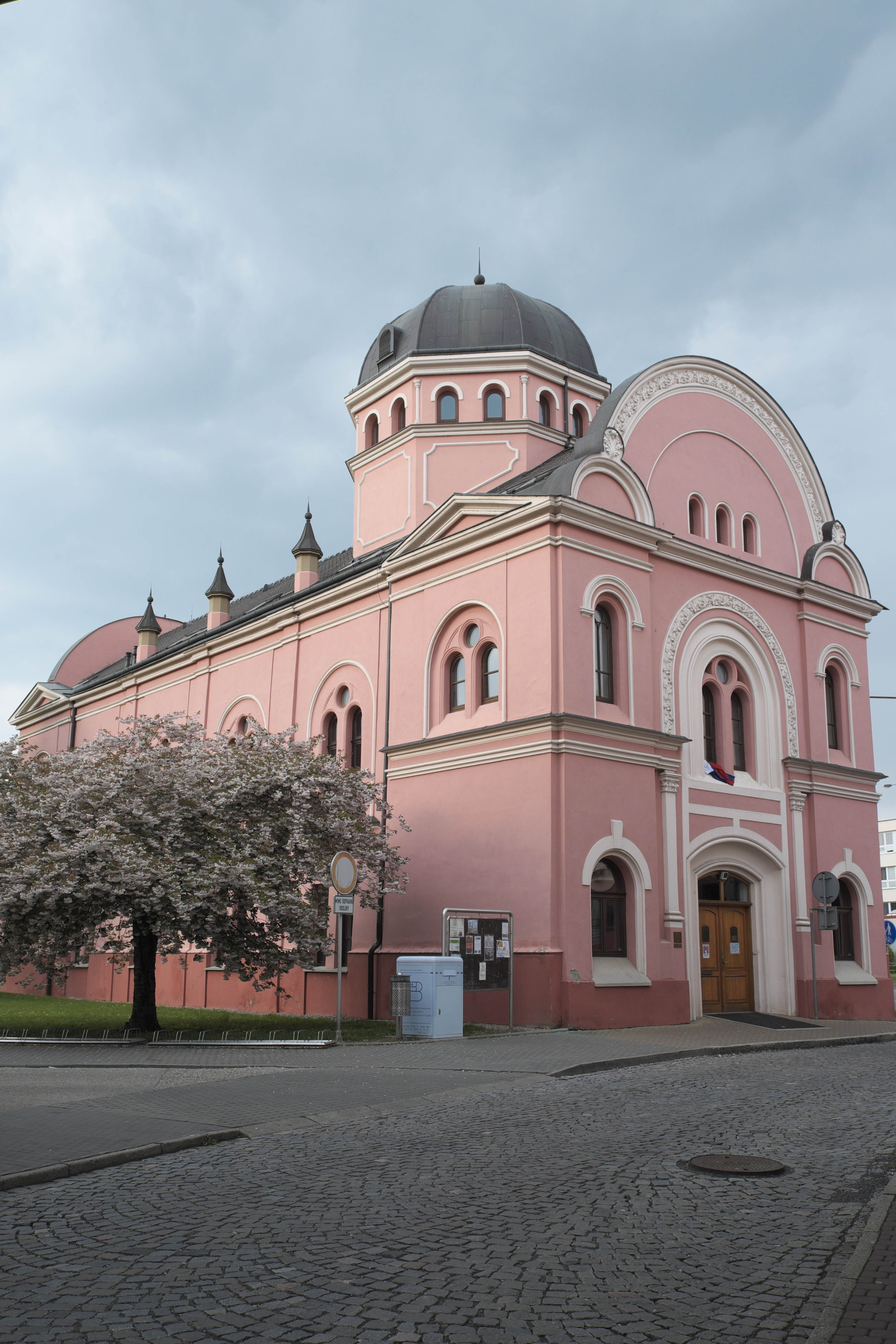 Ehemalige Synagoge, heute Bibliothek, in Uherské Hradiště in der Region Zlin in Tschechien